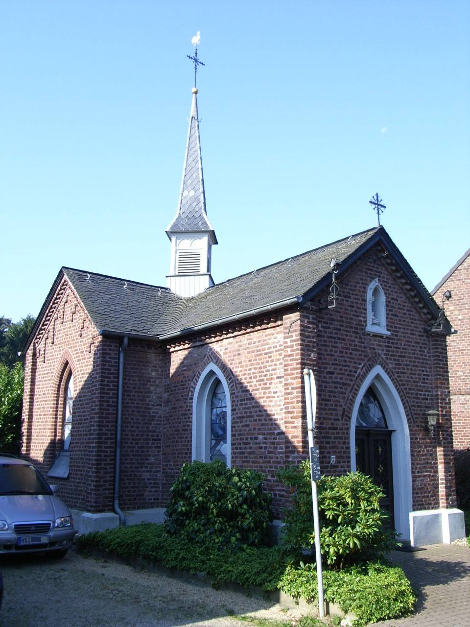 Summary Bildbeschreibung: Kapelle in Kleinbouslar. Quelle: eigenes Foto. Fotograf/Zeichner: bodoklecksel 20:12, 1. Jul 2006 (CEST) Datum: juni 2006... Sonstiges